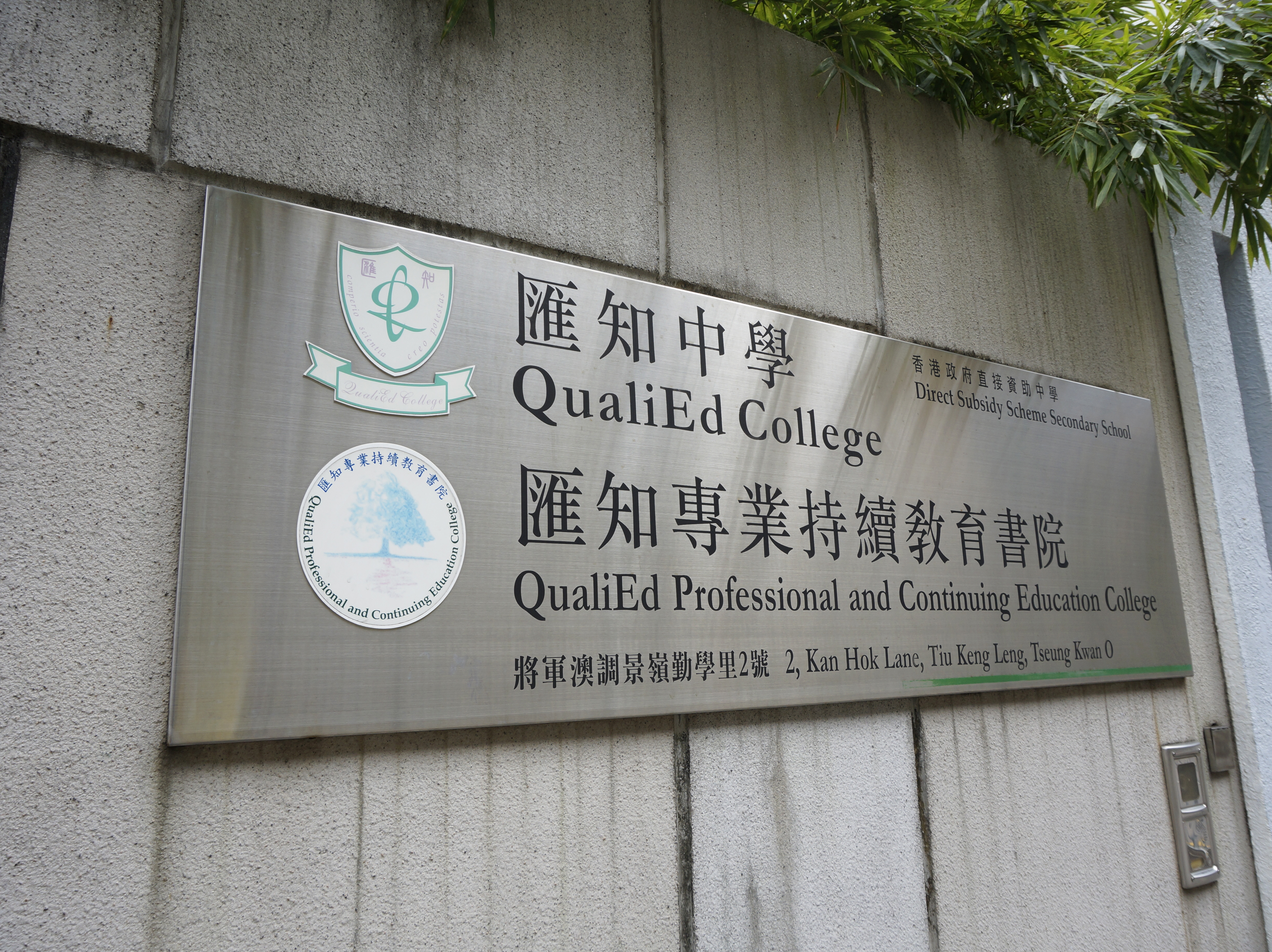 匯知中學的門牌